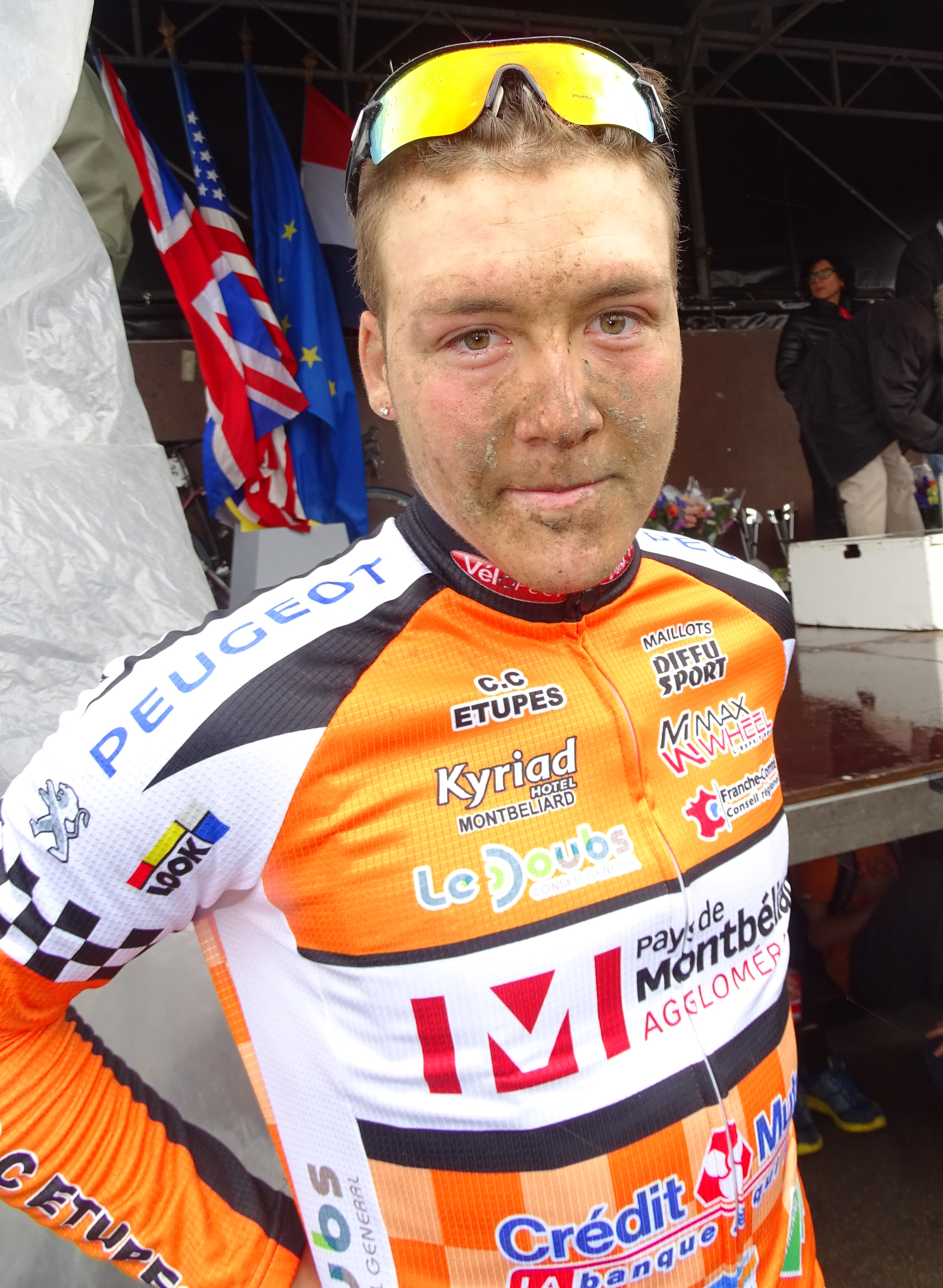 Reportage réalisé le dimanche 31 mai à l'occasion de l'arrivée du Paris-Roubaix espoirs 2015 au vélodrome André-Pétrieux à Roubaix, Nord, Nord-Pas-de-Calais, France. Depicted person: Hugo Hofstetter